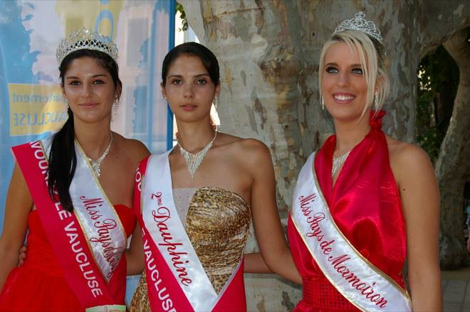 miss pays d'avignon et sa dauphine ainsi que miss pays de mormoiron a vaison la romaine